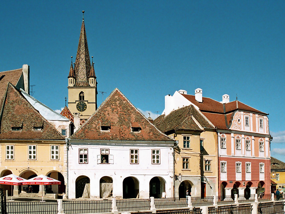 Der Kleine Ring in Hermannstadt. Sonstiges: ...